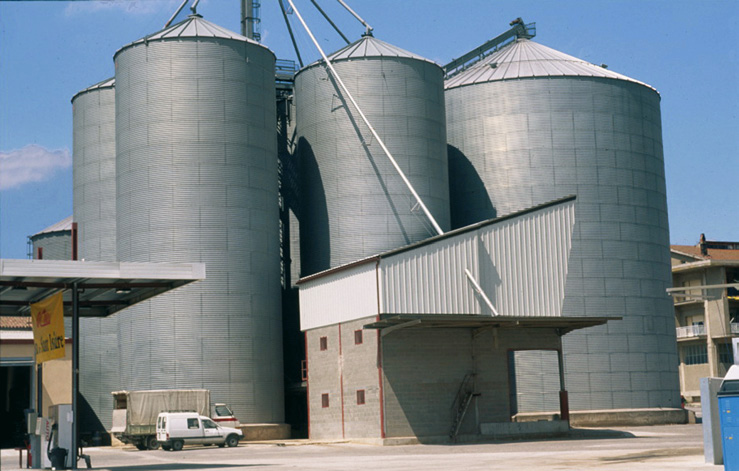 Sitja cilíndrica a Santa Coloma de Queralt (Conca de Barberà), 16 de maig de 2001.